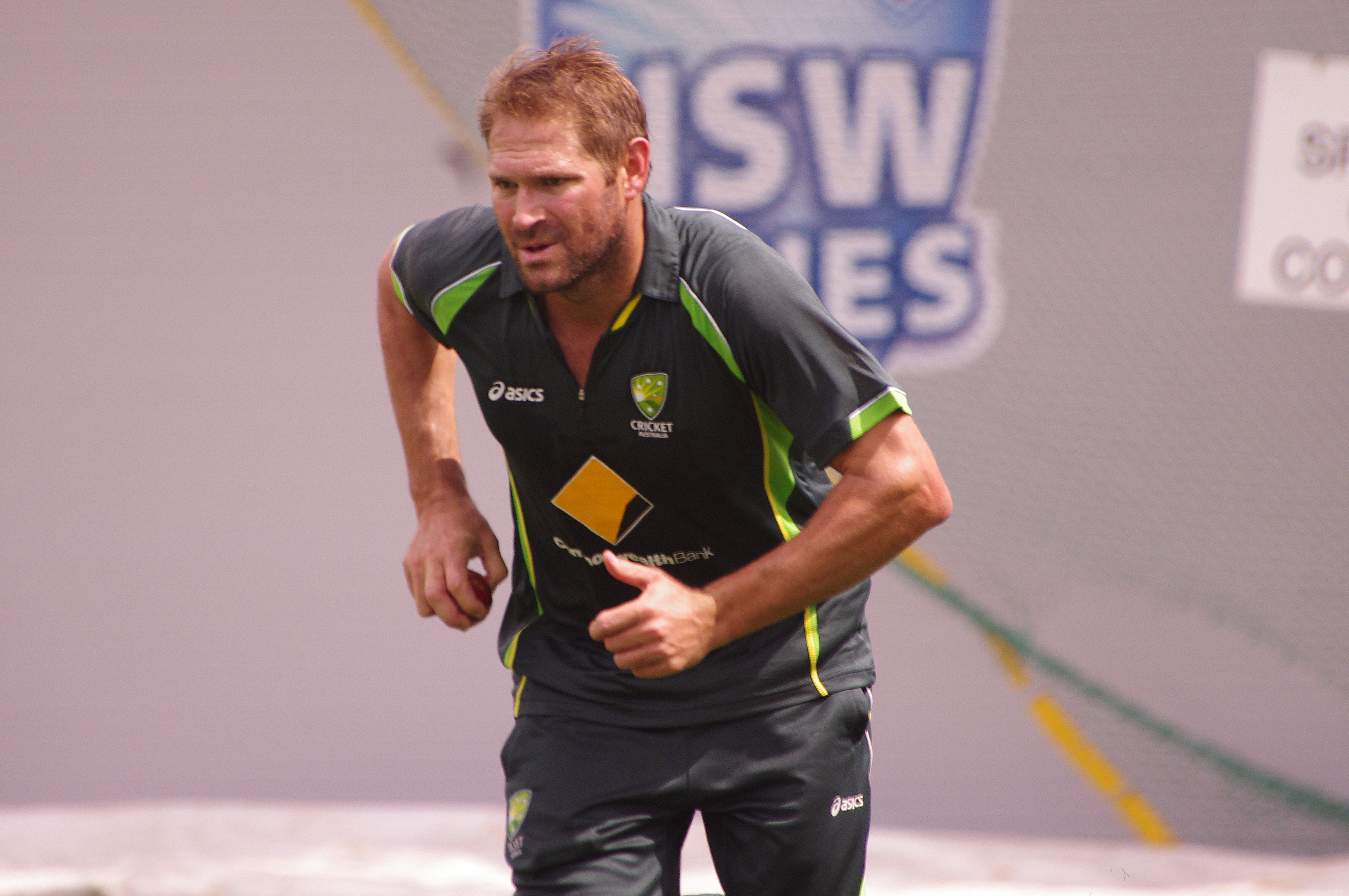 RYAN HARRIS